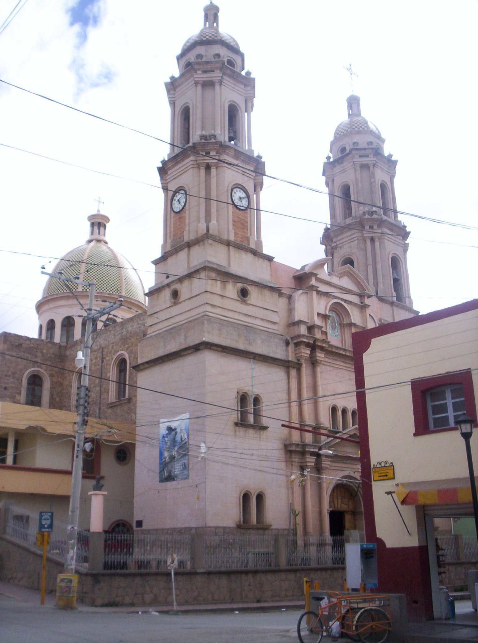 Templo del Señor de la Santa Veracruz